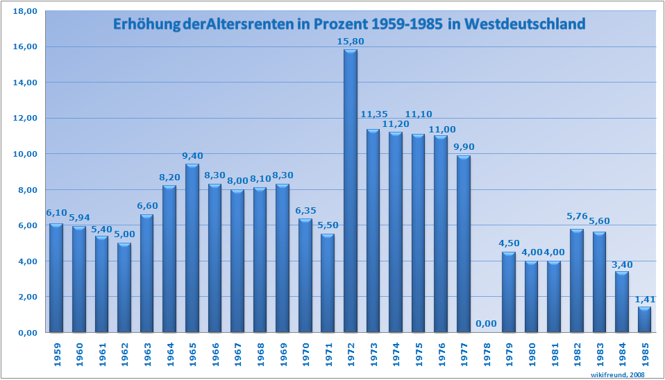 Jährliche prozentuale Erhöhung der Altersrenten (Rentenanpassungen) in der Gesetzlichen Rentenversicherung in der Bundesrepublik Deutschland von 1959 bis 1985.